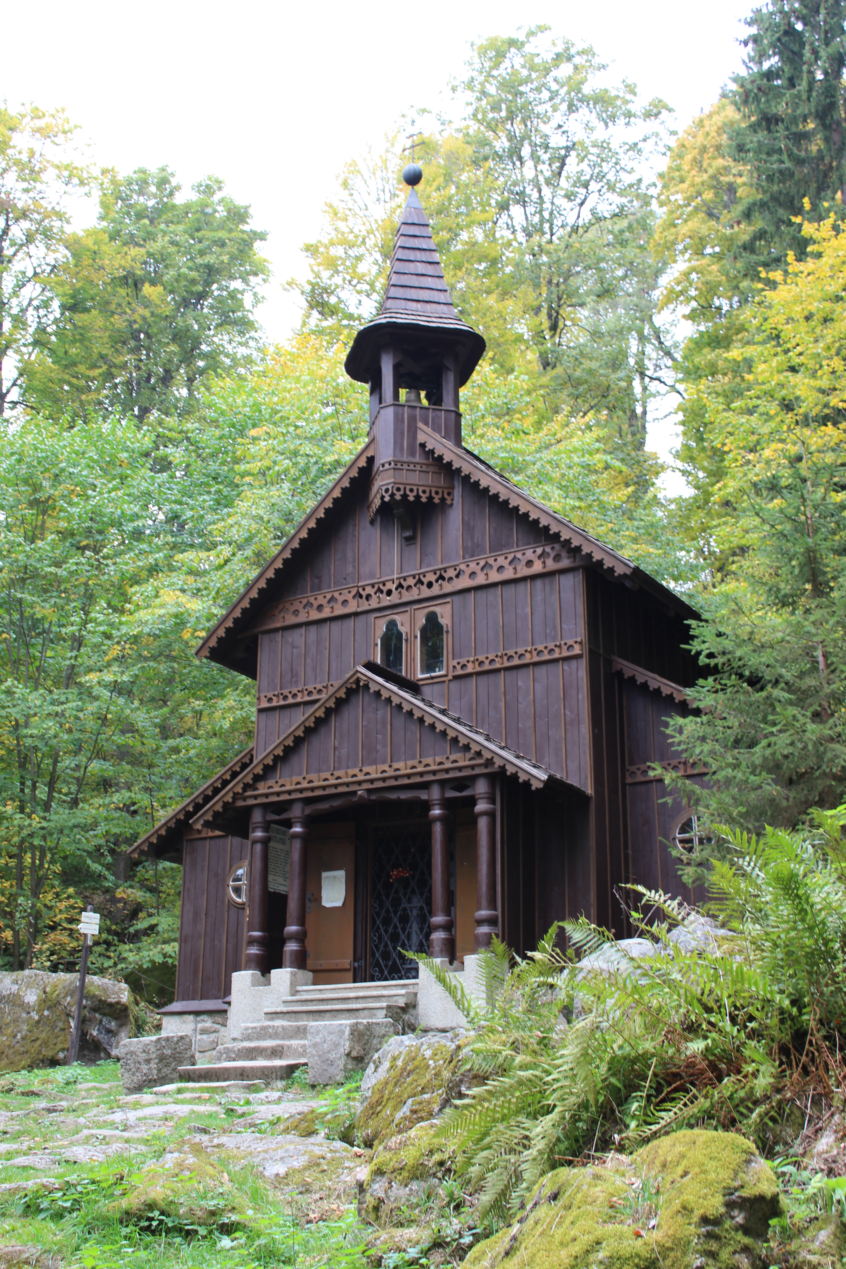 Stožecká kaple - kaple Panny Marie. Stožec. Okres Prachatice. Česká republika.